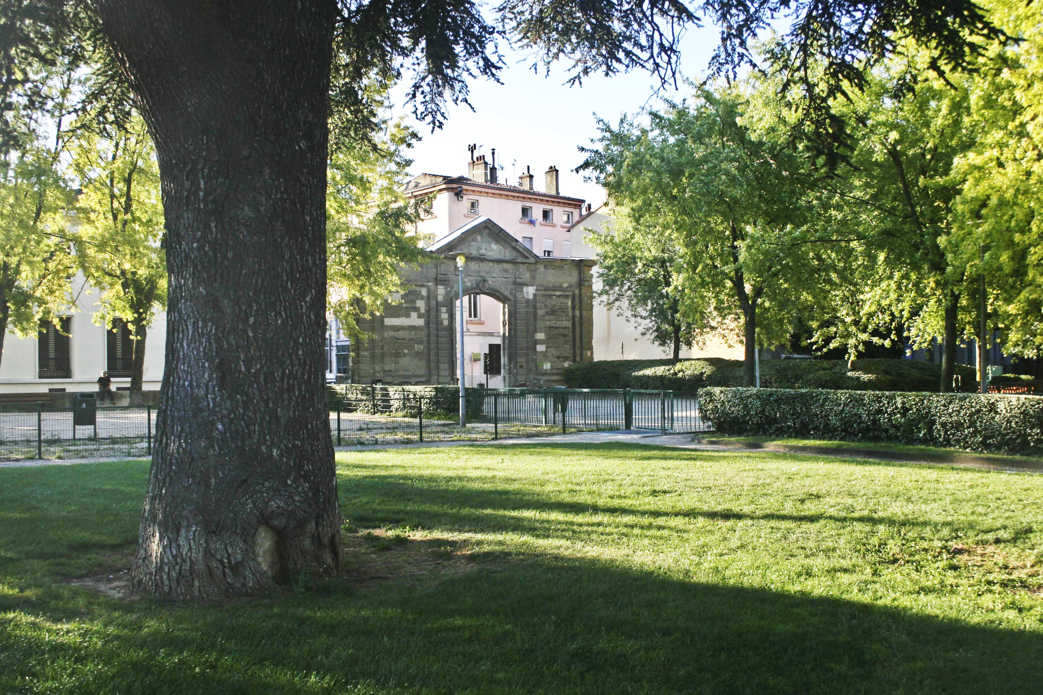 Parc Saint-Ruf, sur l’emplacement de l’ancienne abbaye de Saint-Ruf, puis de la Préfecture de la Drôme, à Valence (Drôme, France).